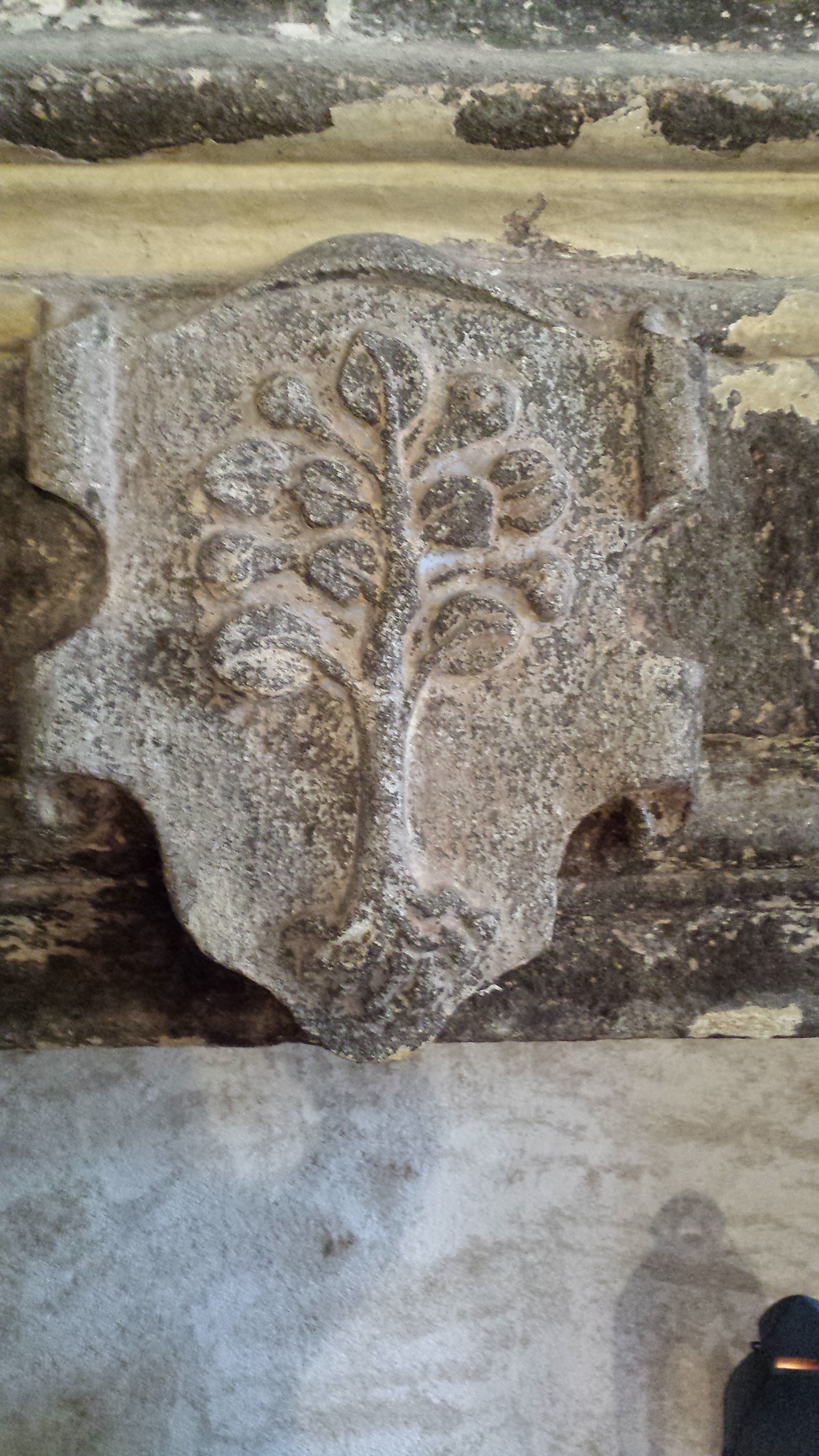 Blason de la cheminée XVe siècle, hôtel de la Chanterie.